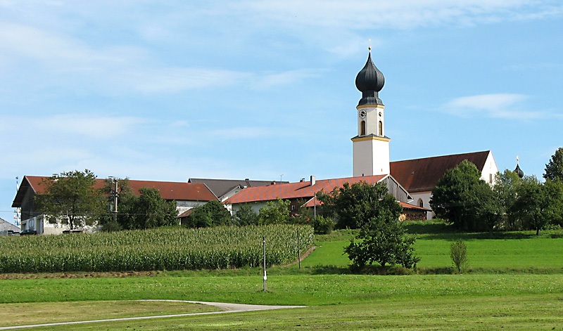 Blick auf die Kirche von Schonstett (Landkreis Rosenheim, Bayern, Deutschland) aus Nord-West